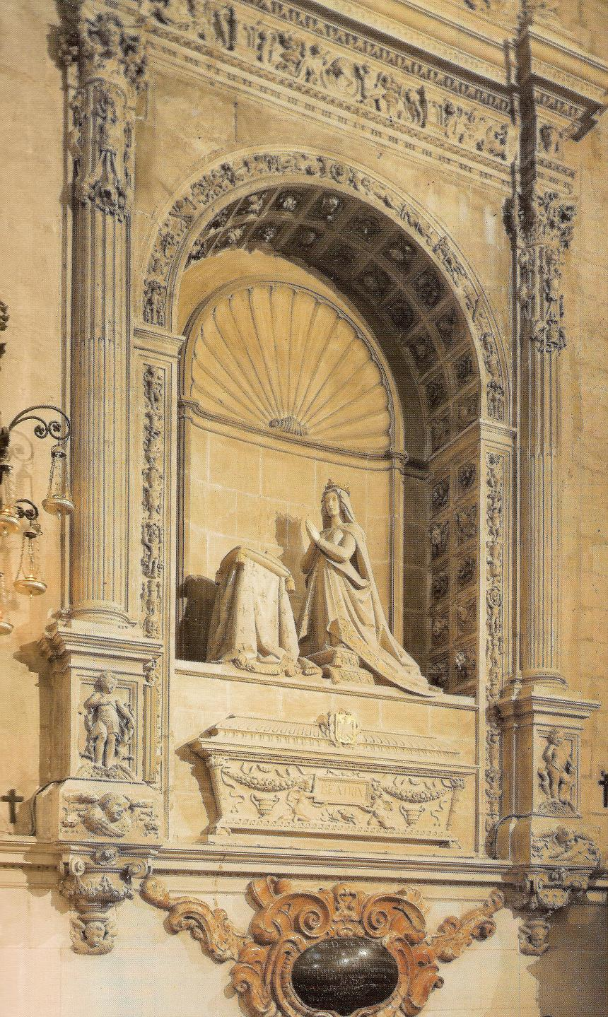 Sepulcro de la reina Beatriz de Suabia (1205-1235), que fue esposa de Fernando III el Santo y madre de Alfonso X el Sabio, en la Capilla Real de la catedral de Sevilla, (España).